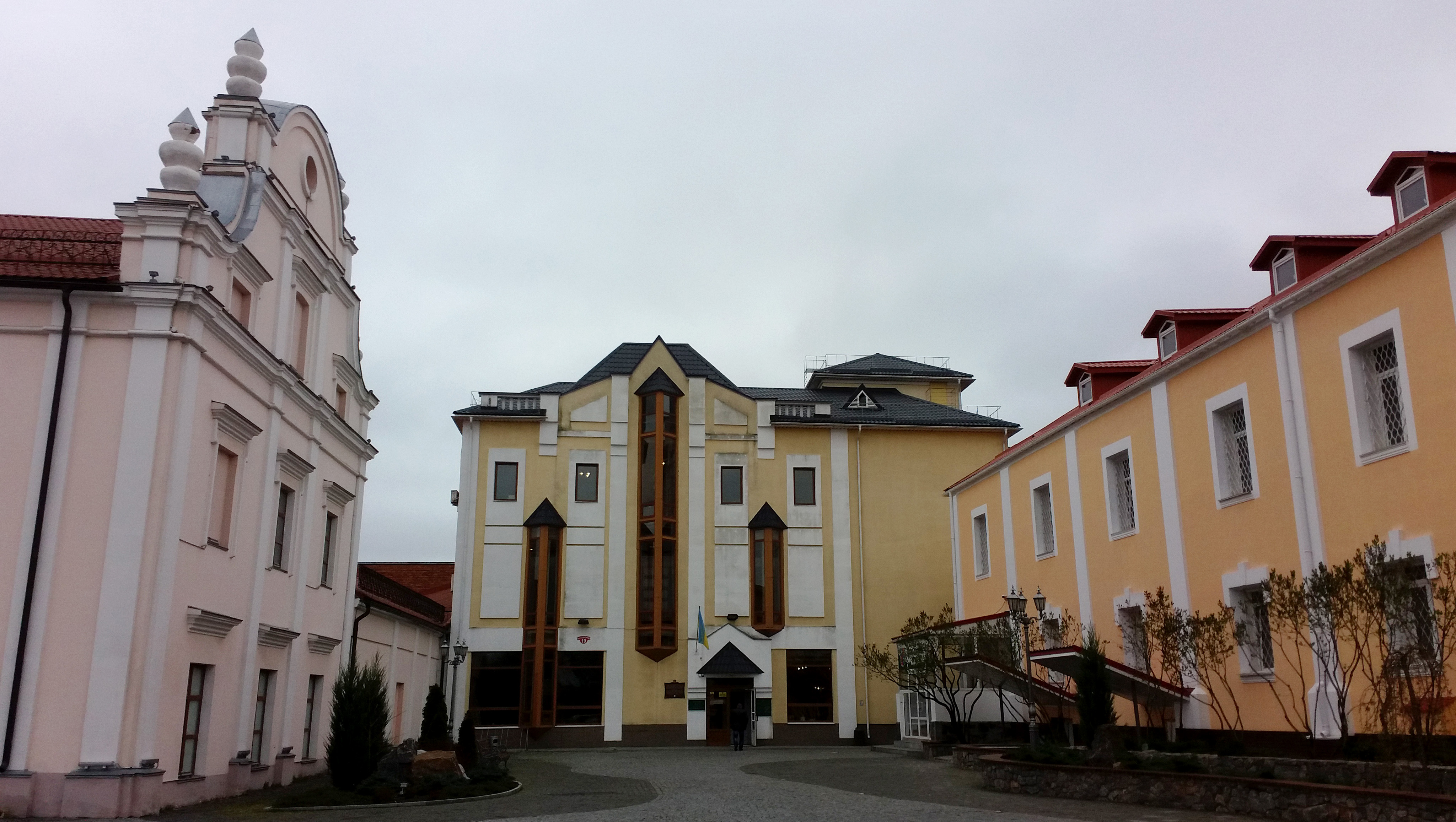 Вінницький обласний краєзнавчий музей. вулиця Соборна, 19, м. Вінниця